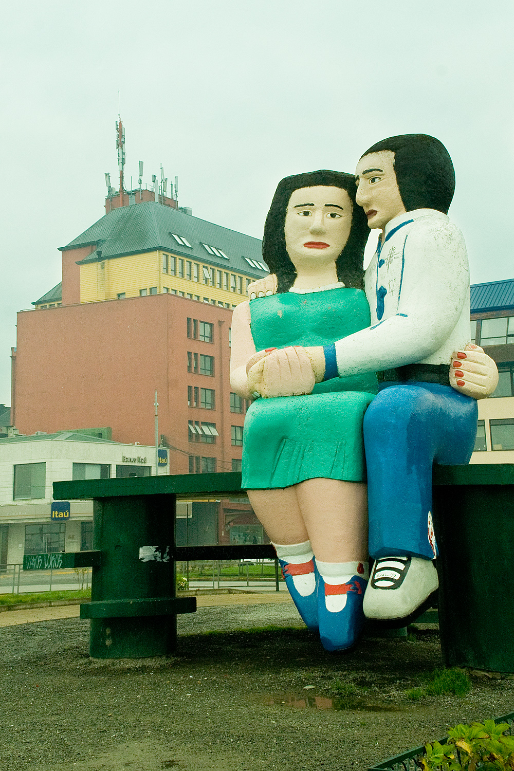 Puerto Montt - Patagonia chilena